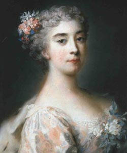 Henriqueta d'Este.